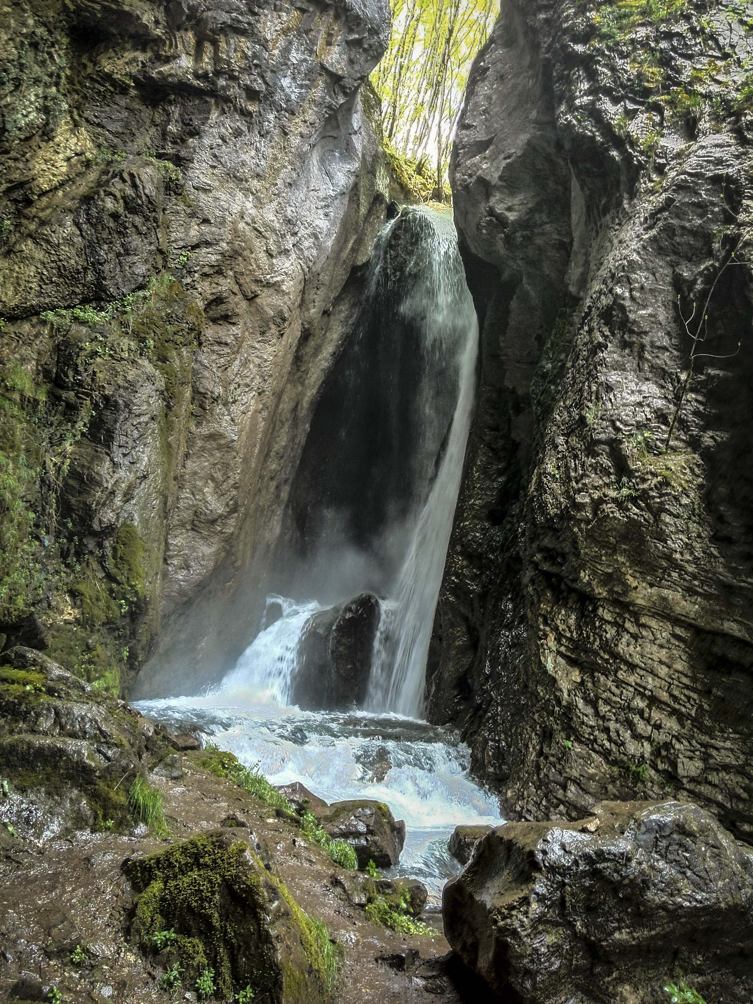 Водопадот Дуф во близина на селото Ростуше